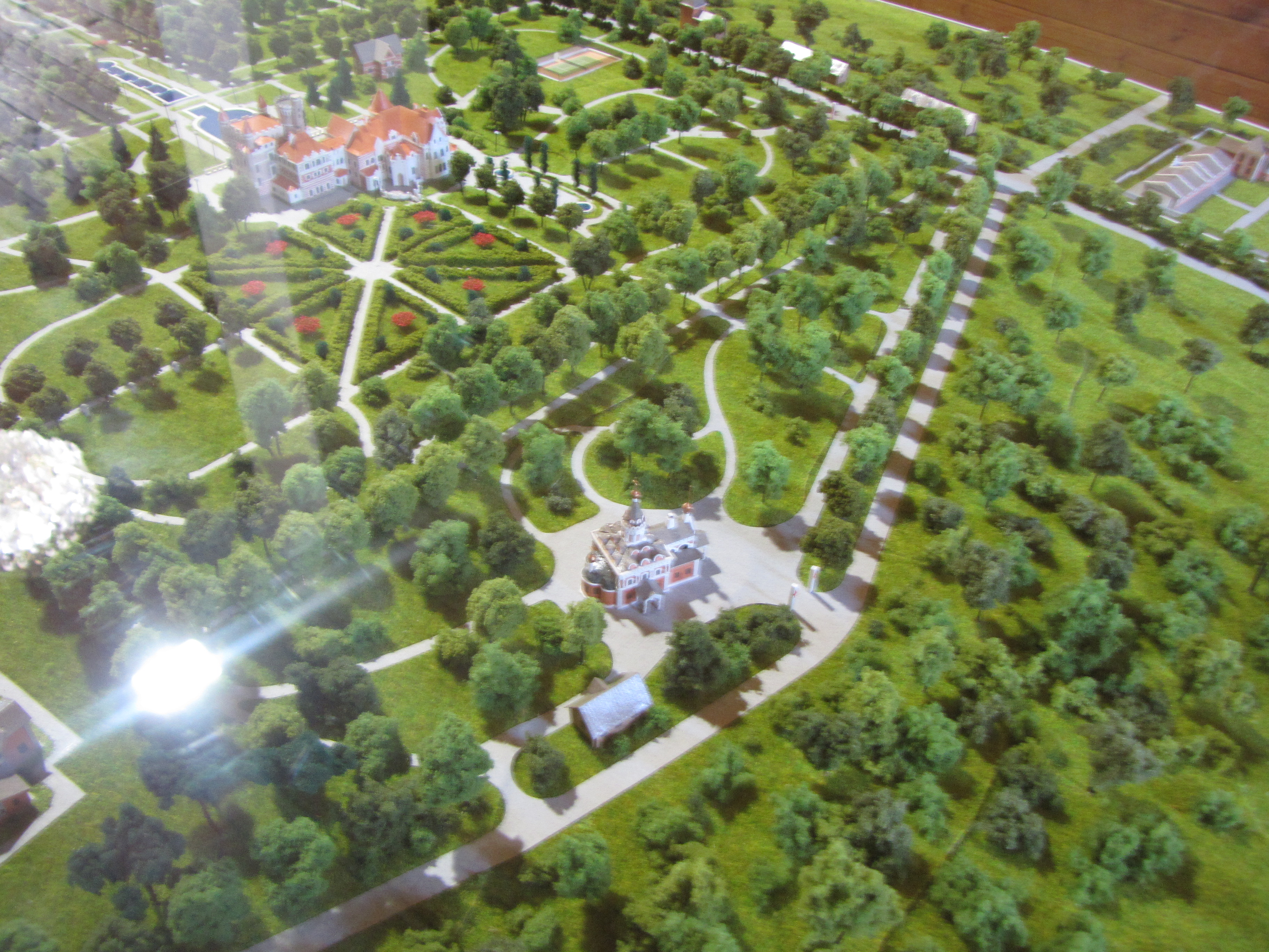 Официальное открытие первой музейной выставки «Усадьба Муромцево: между минувшим и грядущим» в здании бывшего лодочного павильона на берегу Барских прудов.